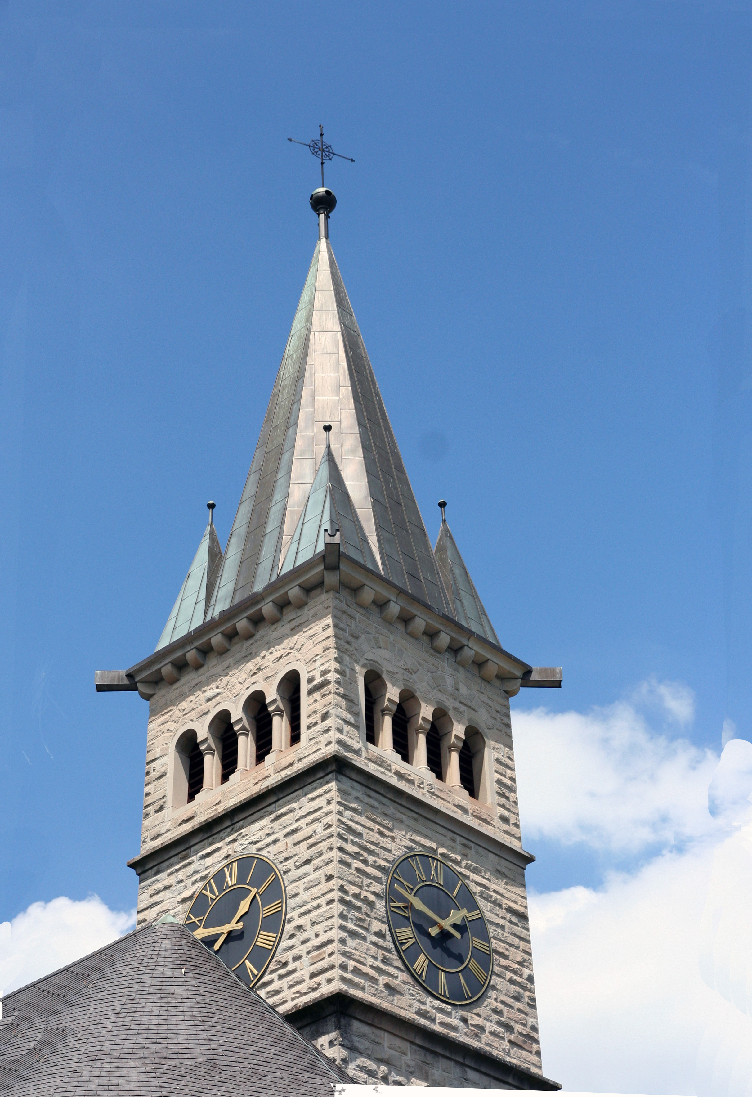 Römisch-katholische Pfarrkirche St. Marien Wädenswil, Turm